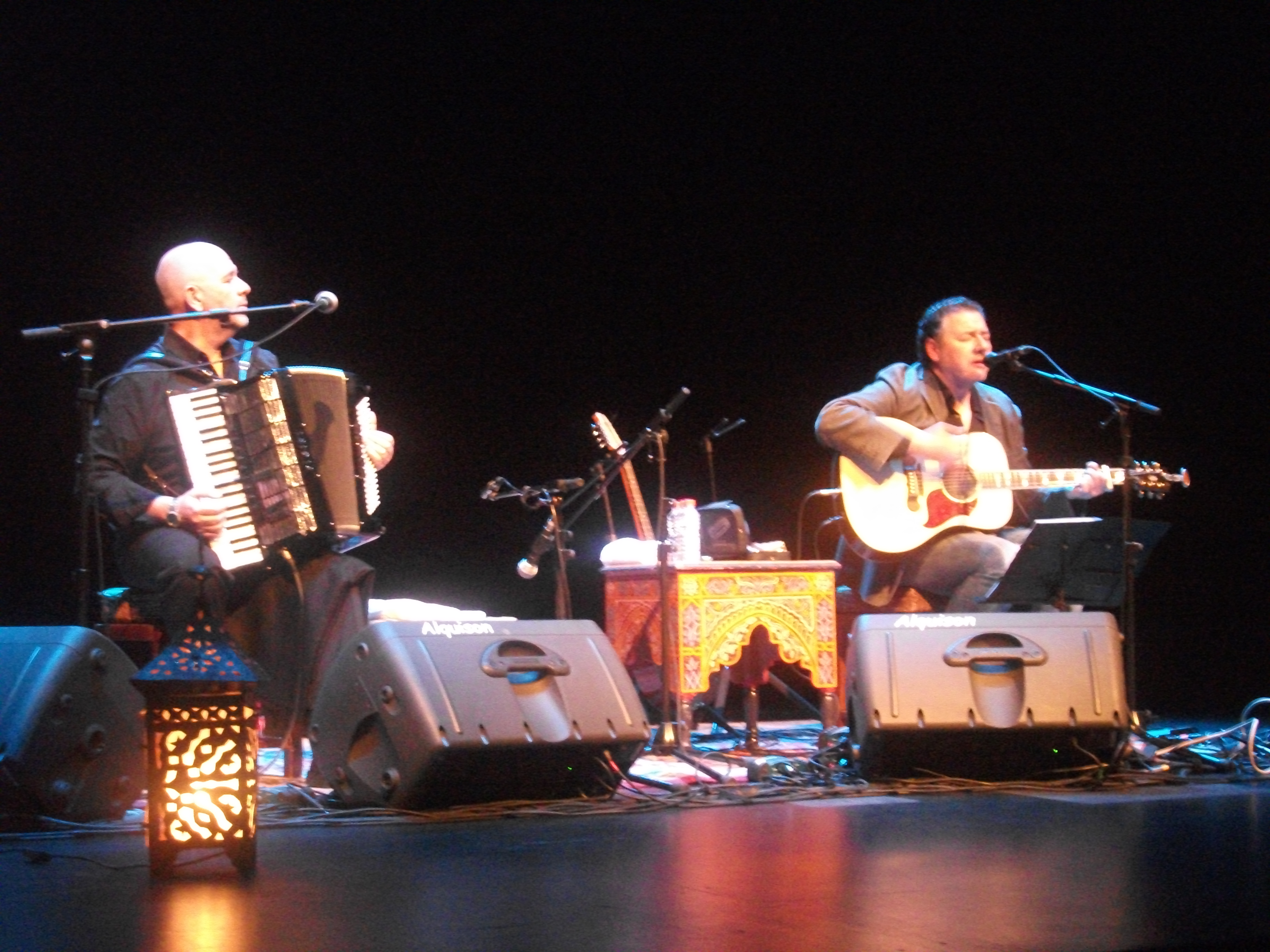 Cuco Pérez (acordeón) y Carlos Goñi (guitarra) en un concierto de Revólver en Piedras Blancas, Asturias, durante la gira de promoción de Argán.